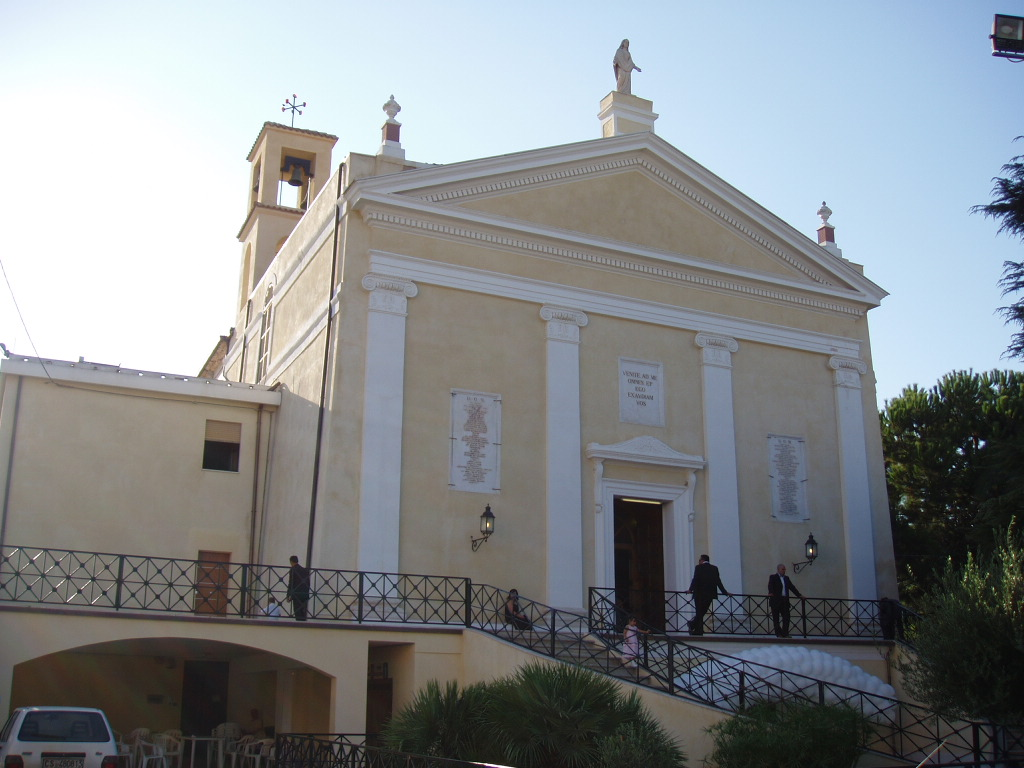 Schiavonea, frazione di Corigliano Calabro: il Santuario di Santa Maria ad Nives detto anche Madonna della Schiavonea.